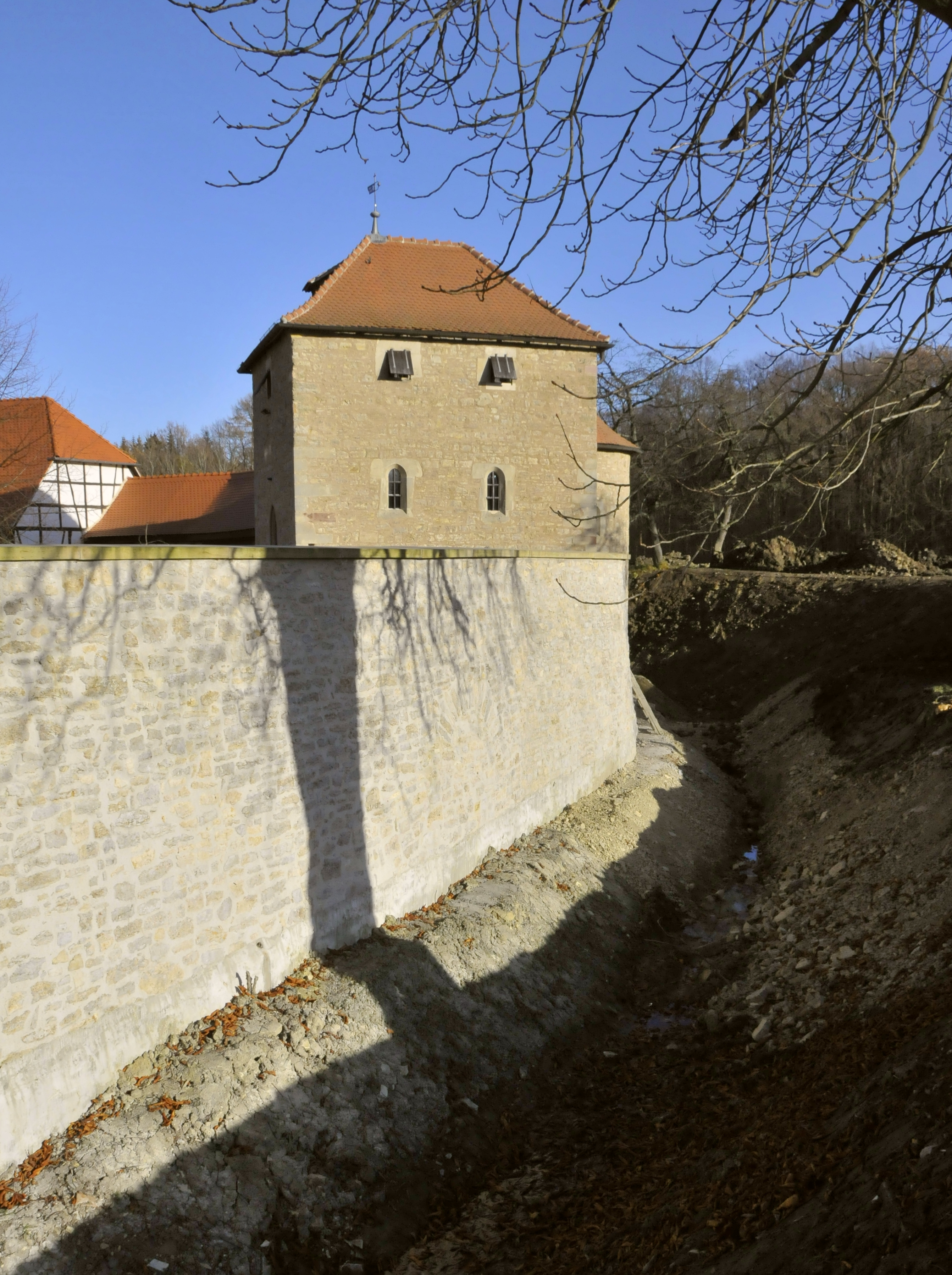 Willroda, Kapelle mit Mauer und Burggraben